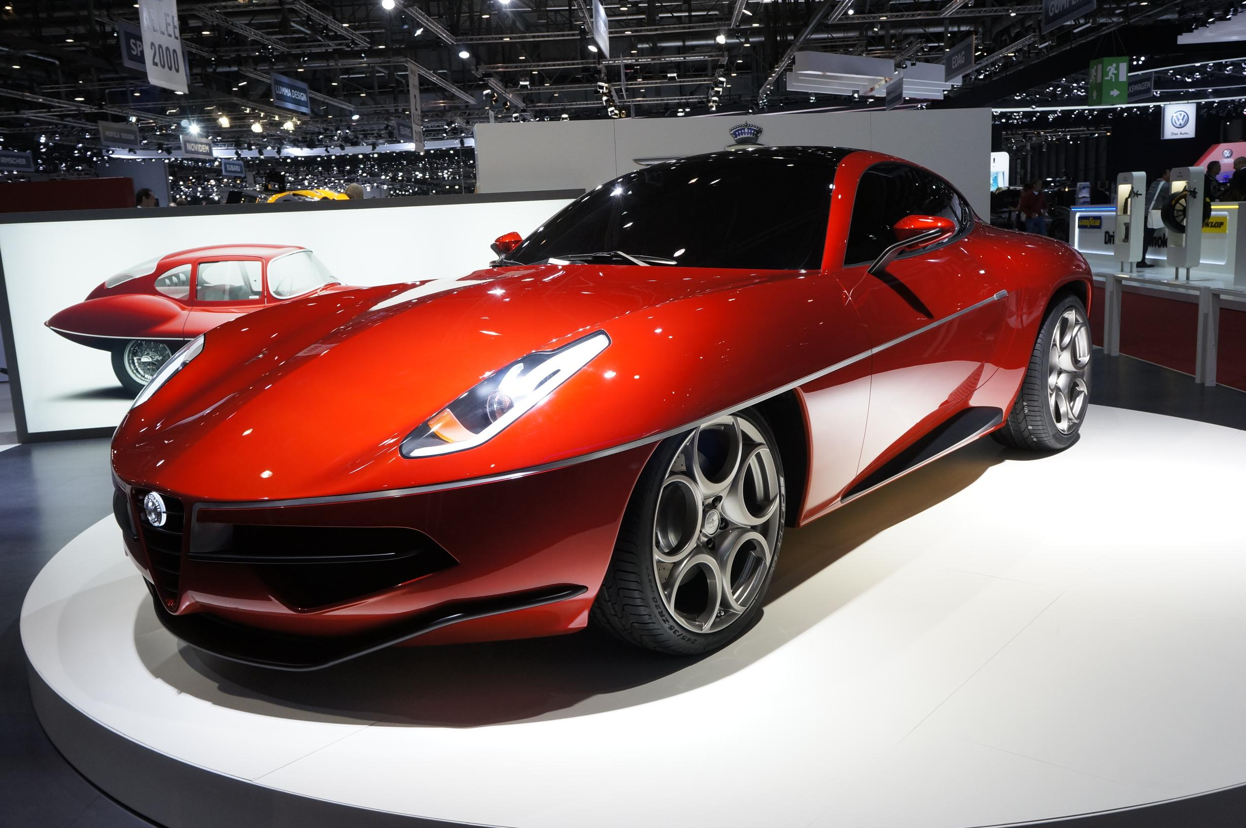 La concept "Disco Volante 2012" realizzata dalla Carrozzeria Touring Superleggera e presentata al salone dell'auto di Ginevra nel 2012